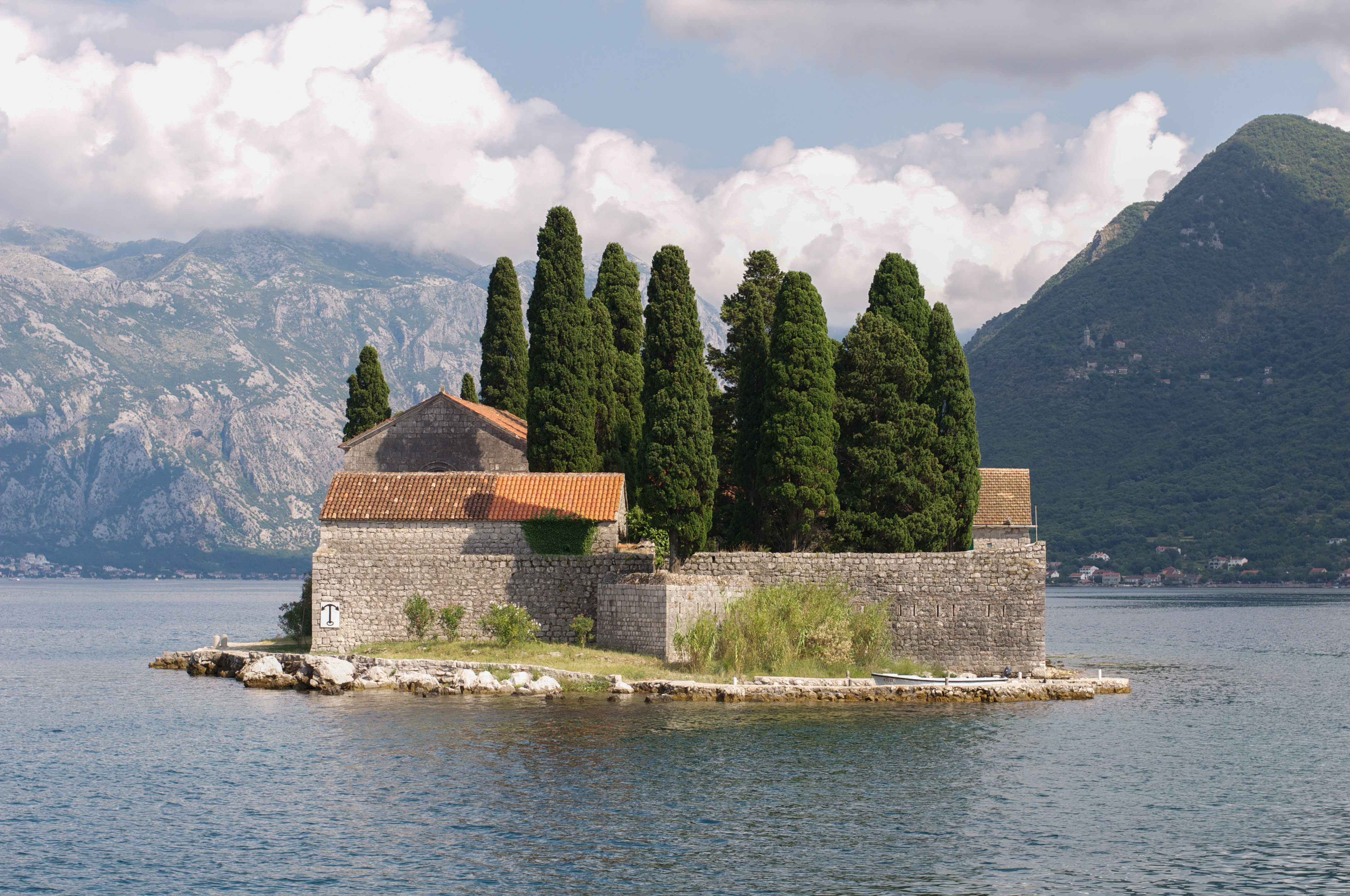 Montenegro